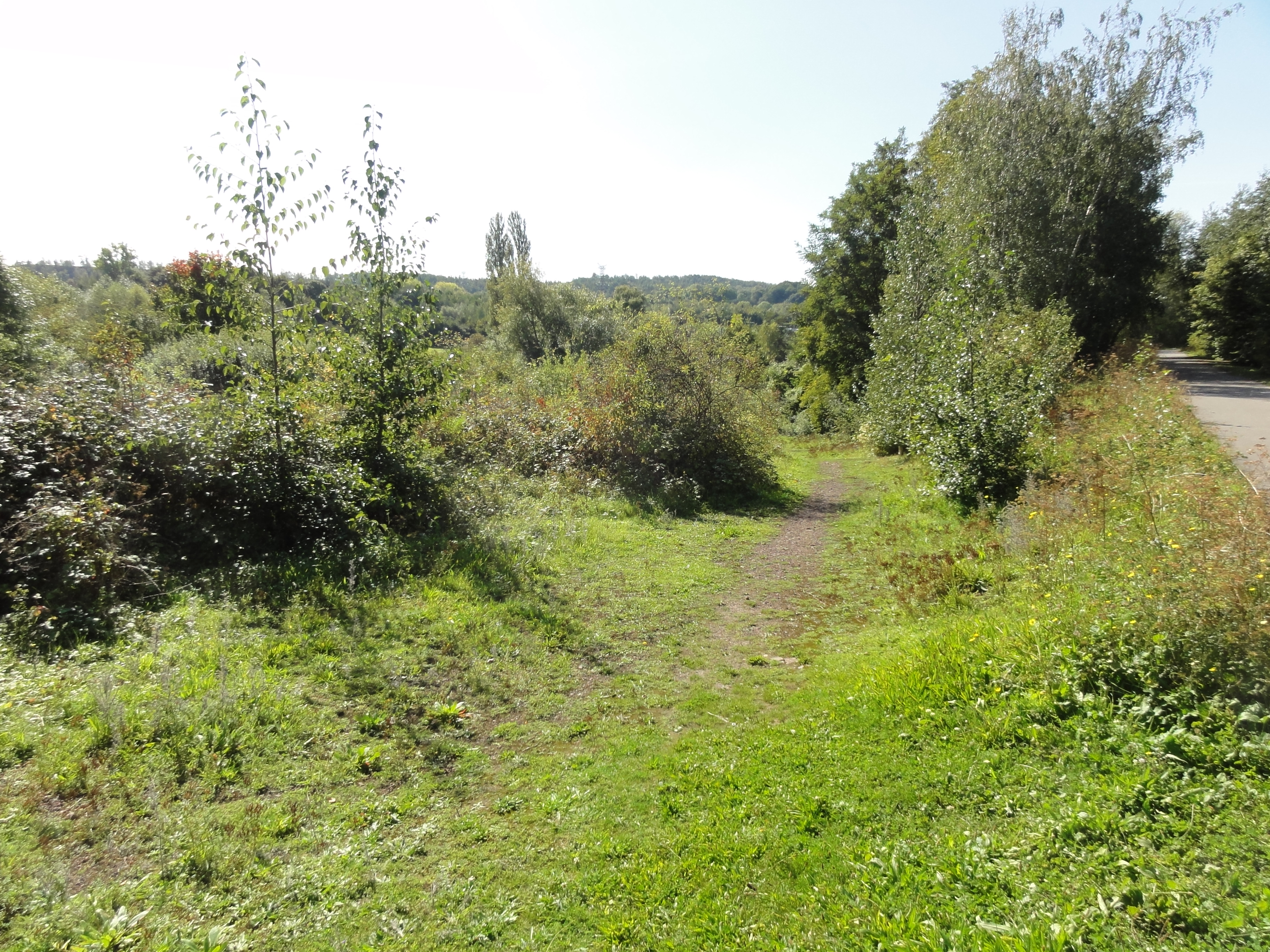 Terril n° 80A dit Garennes Pont Ampère, fosse n° 3 - 3 bis - 3 ter de la Compagnie des mines de Liévin dans le bassin minier du Nord-Pas-de-Calais, Éleu-dit-Leauwette, Pas-de-Calais, Nord-Pas-de-Calais, France.